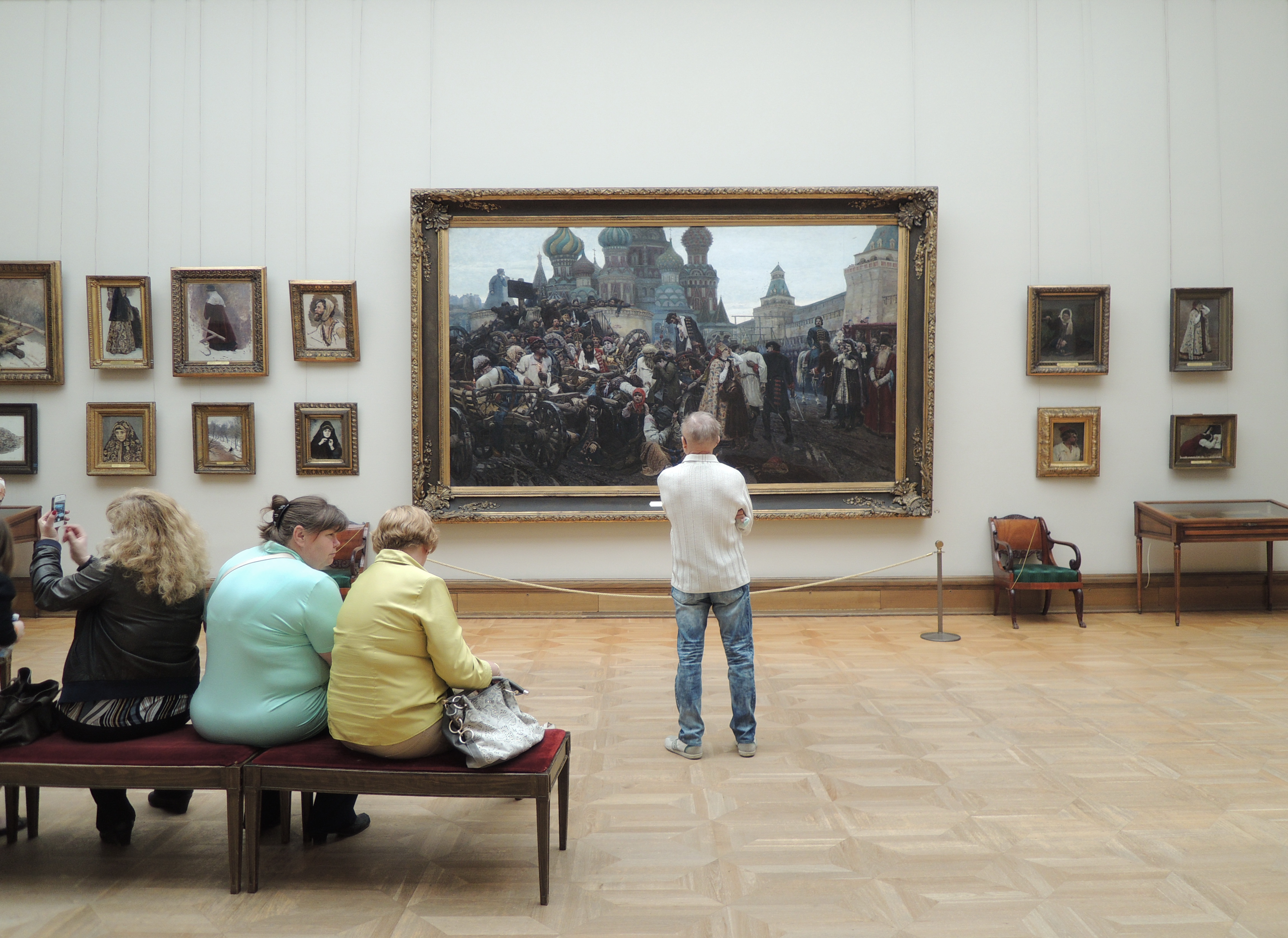 Зал Сурикова в Третьяковской галерее (главное здание)